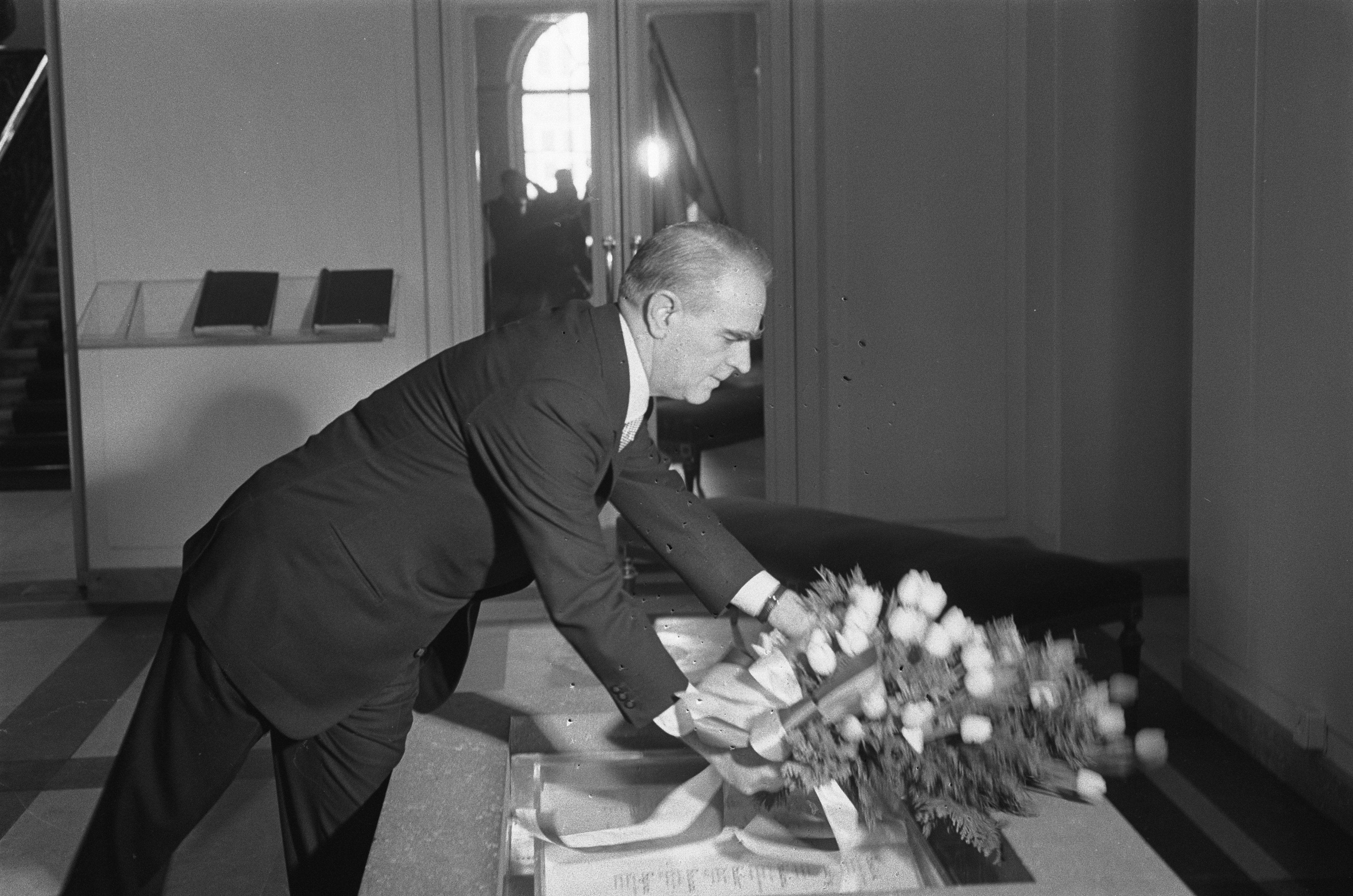 Collectie / Archief : Fotocollectie Anefo Reportage / Serie : [ onbekend ] Beschrijving : Griekse Minister-President bezoeken gebracht aan voorzitt Eerste en Tweede Kamer . Minister-President Caramanlis l bloemen bij het betreden van het gebouw / Datum : 1 maart 1963 Trefwoorden : BLOEMEN, bezoeken, gebouwen, ministers Persoonsnaam : Caramanlis Instellingsnaam : Tweede Kamer Fotograaf : Pot, Harry / Anefo Auteursrechthebbende : Nationaal Archief Materiaalsoort : Negatief (zwart/wit) Nummer archiefinventaris : bekijk toegang 2.24.01.05 Bestanddeelnummer : 914-8832